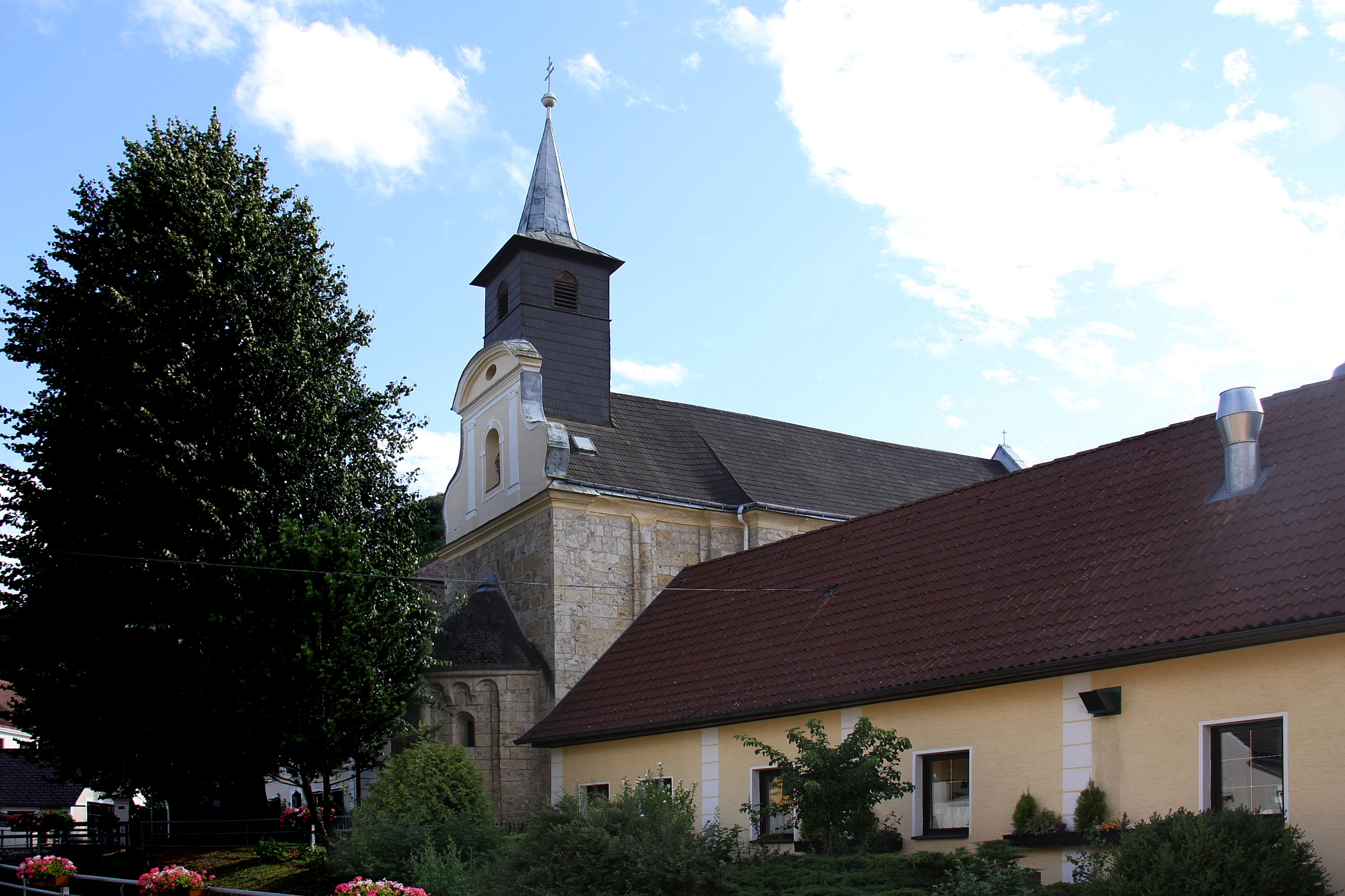 Denkmalgeschützte römisch-katholische Pfarrkirche Unbefleckte Empfängnis Mariae in der Katastralgemeinde Thernberg, in Scheiblingkirchen-Thernberg. Object location47° 39′ 41.65″ N, 16° 10′ 36.34″ E